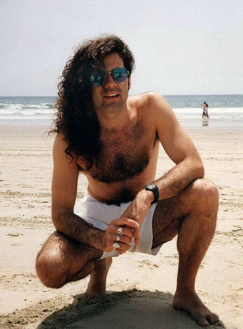 Santi Rubio en su tiempo libre en Santa Monica Los Angeles